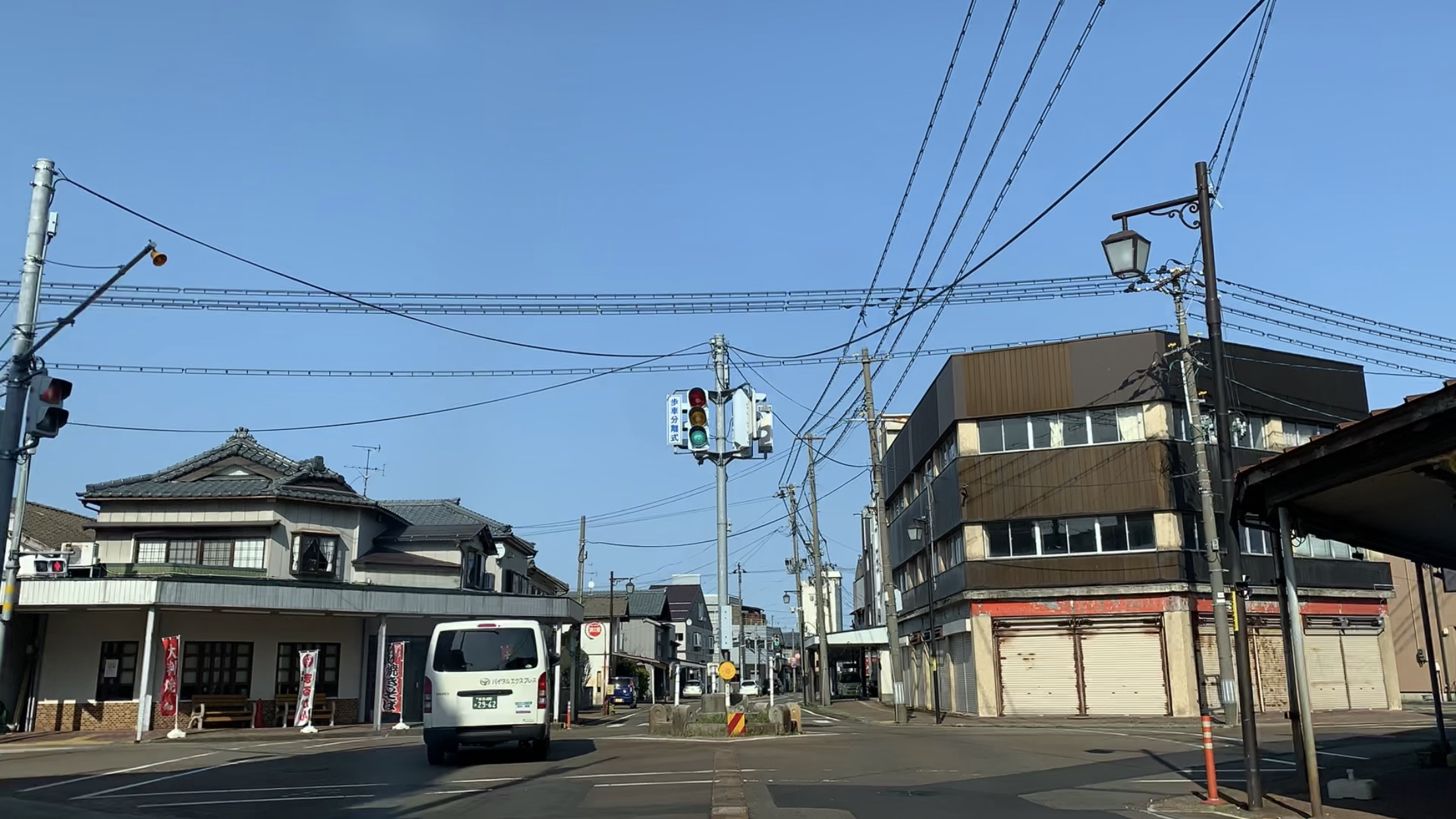 吉田旭町ロータリー（新潟県燕市，2020年3月）